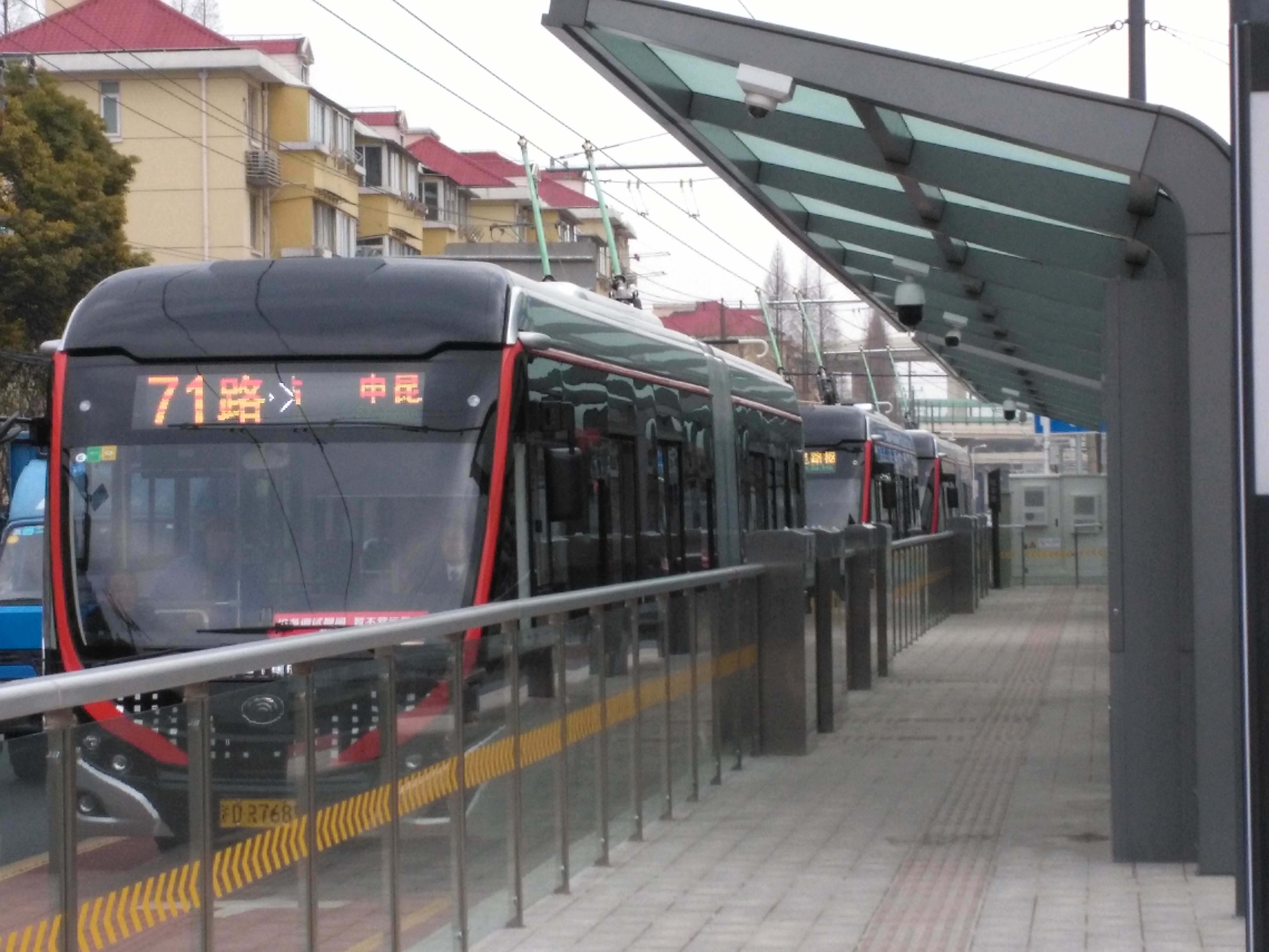 中文（中国大陆）: 延安路中运量系统工程航东路站，市区往申昆路方向